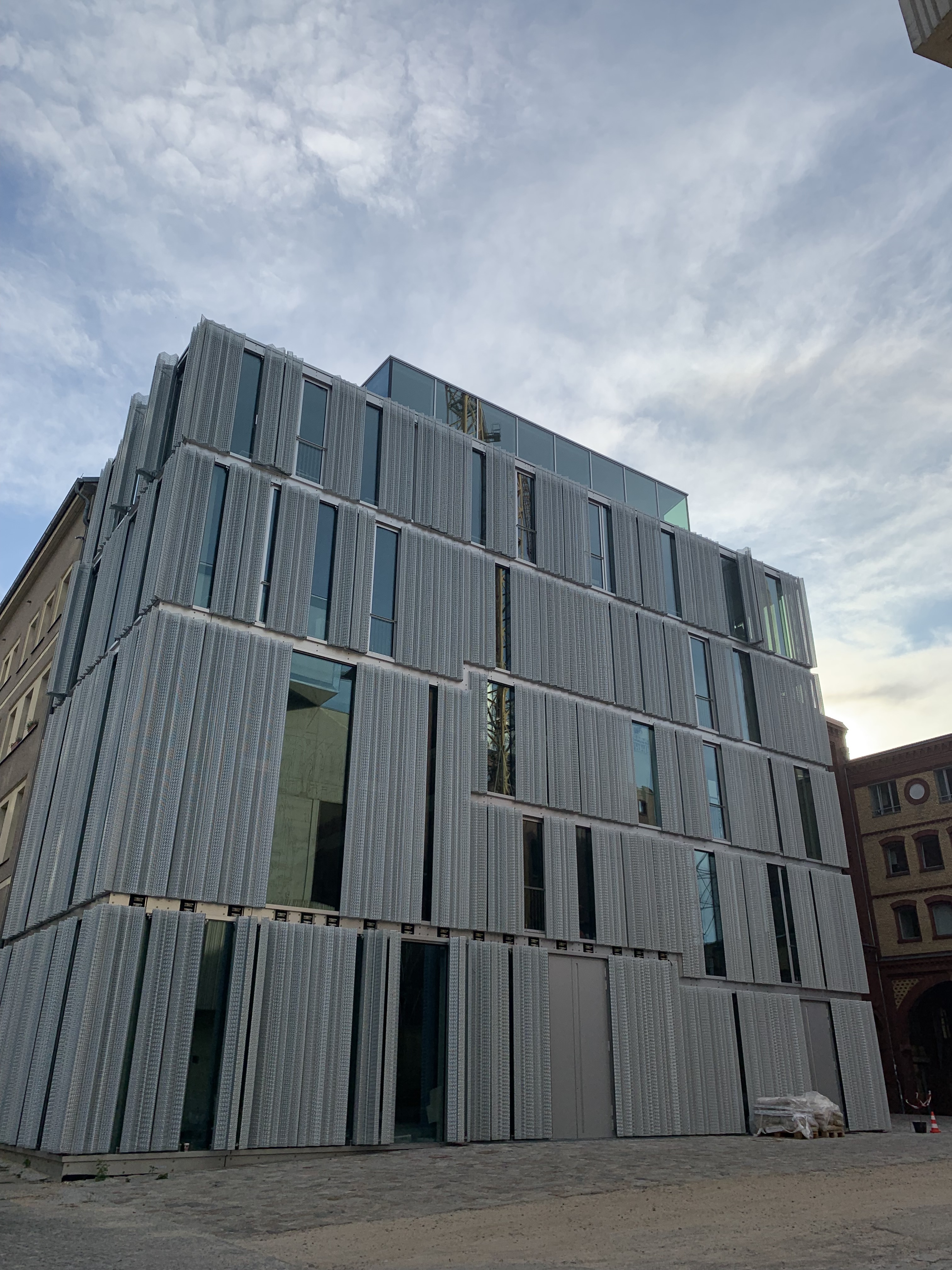 Pfefferberg Eingang Christinenstr. 19a Giebelbau